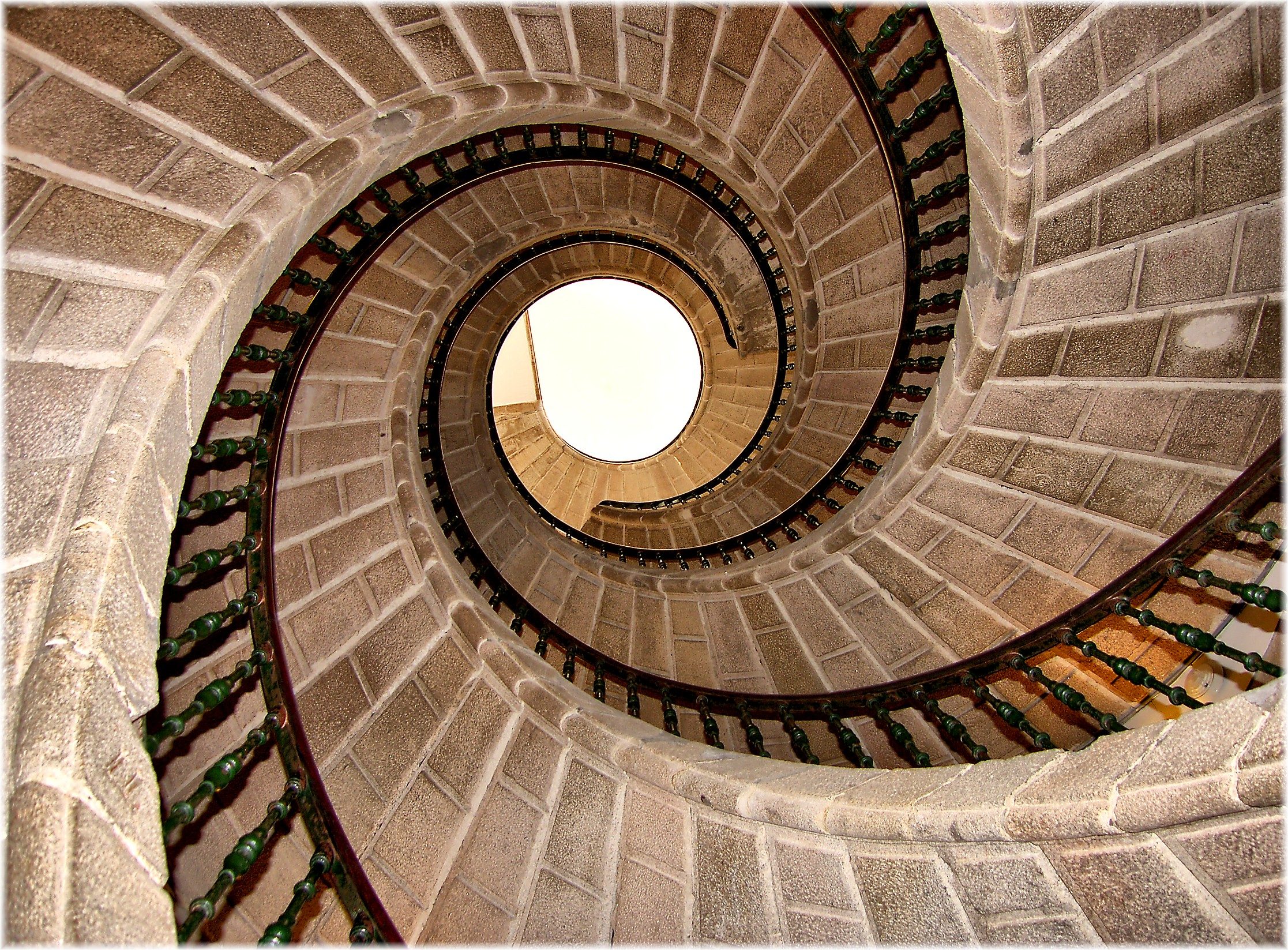 O Convento de San Domingos de Bonaval é un antigo convento dominico do século XIII cunha fábrica composta de elementos góticos, barrocos e neoclásicos. A triple escaleira helicoidal Destaca no seu interior a extraordinaria escaleira tripla de caracol helicoidal dos séculos XVII e XVIII, obra tamén do arquitecto Domingo de Andrade. Componse de tres espirais independentes. O estudoso Ríos Miramontes relacionouna coa que se atopa no francés Castelo de Chambord. No mesmo espazo desenvólvense tres ramplas independentes, que conducen a diferentes pisos; só unha delas chega ao miradoiro. Os pasos da escaleira están feitos dunha peza enteira, encravándose por un nervio exterior sen necesidade de encaixar no muro nin unirse uns os outros. Foi restaurada por Xosé Cerviño García, o Mestre Cerviño. O antigo convento e a actual sede do Museo do Pobo Galego. A horta conventual e o cemiterio anexo transformáronse a finais do século XX nun amplo e tranquilo parque público. Na Galipedia, a Wikipedia en galego.